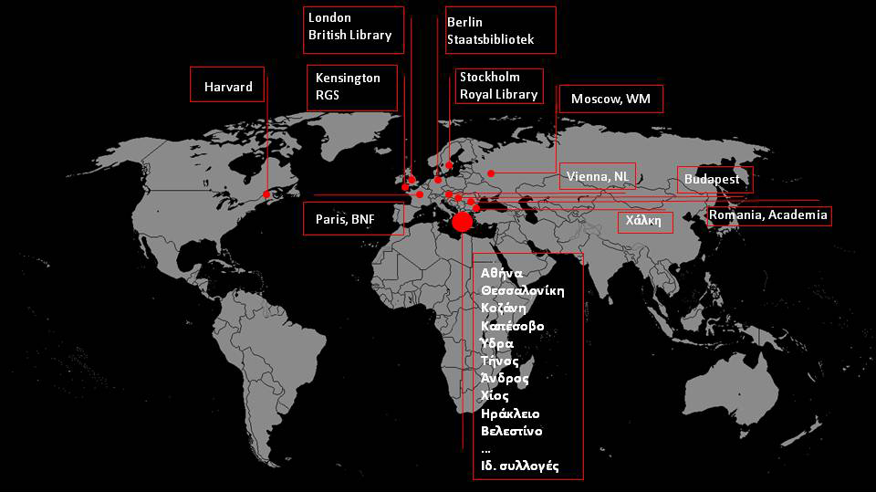 Η Χάρτα τυπώθηκε σε 1220 αντίτυπα. Από αυτά, σήμερα (2014) σώζονται 38 αντίτυπα στην Ελλάδα και 19 στον υπόλοιπο κόσμο, σε μεγάλες βιβλιοθήκες ή ιδιωτικές συλλογές. Προέλευση εικόνας: Maria Th. Pazarli / Aristotle University of Thessaloniki - / Righas Velestinlis’ Map (Charta) of Greece: a cartographic approach, by Maria Pazarli - AUTH